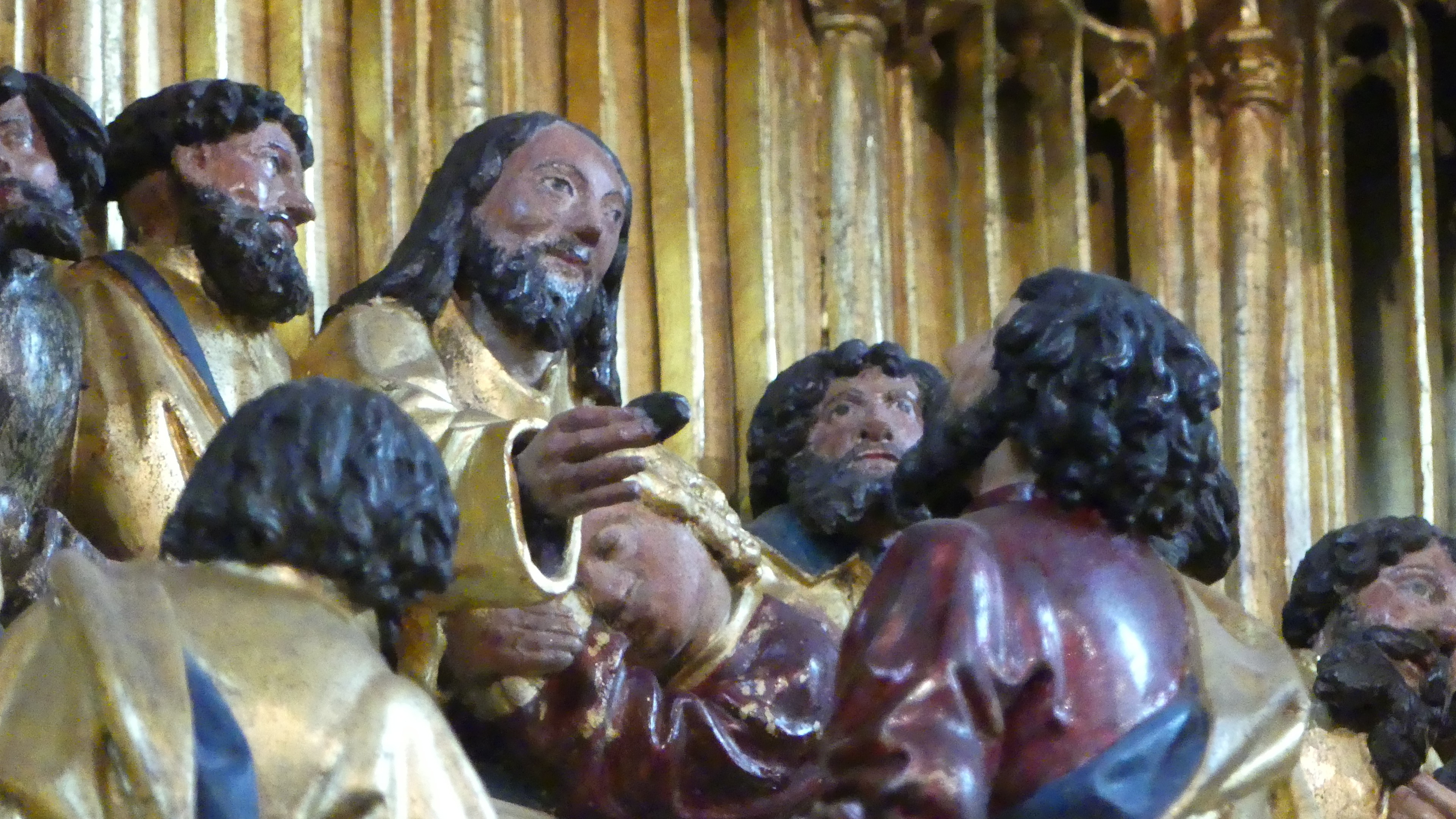 Altar von Jan Borman (Datail)